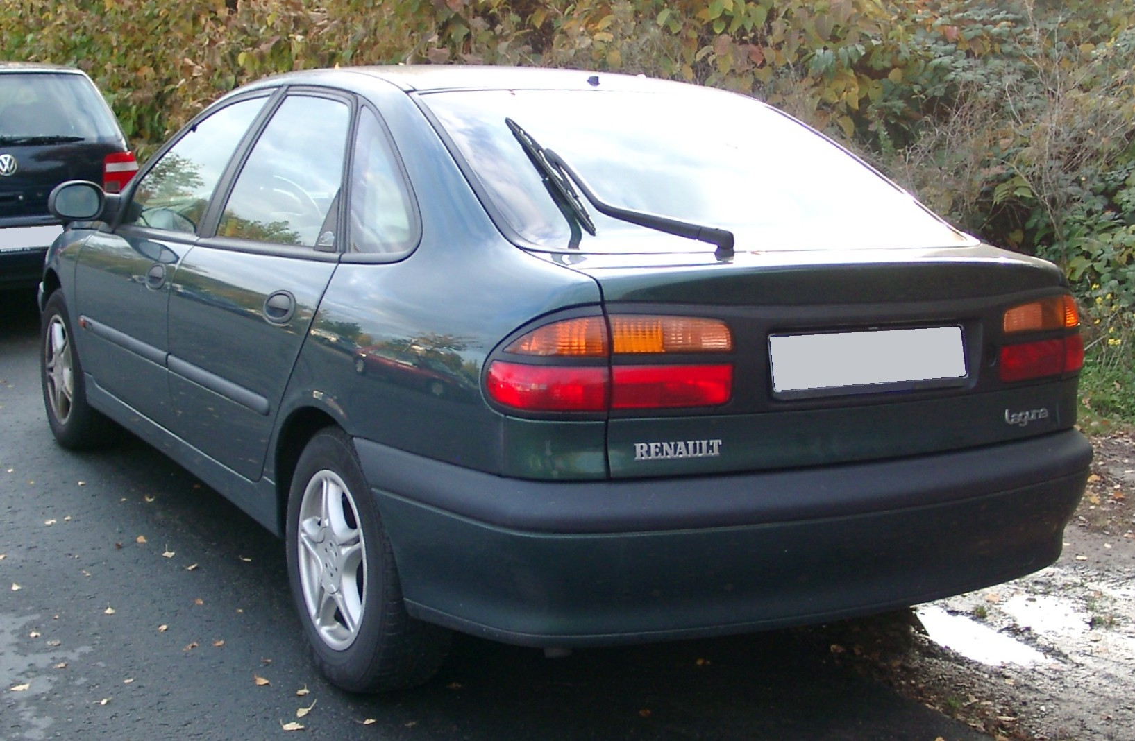 Renault Laguna